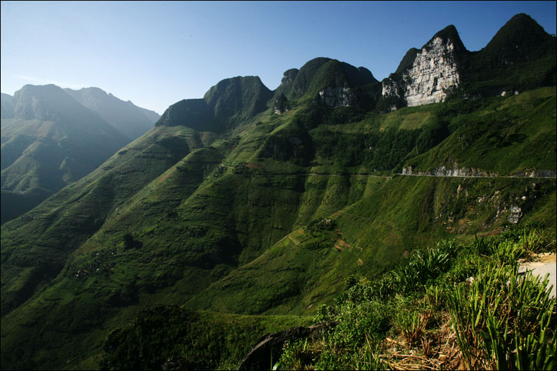 Đèo Mã Pì Lèng, nối Mèo Vạc với Đồng Văn, Hà Giang.